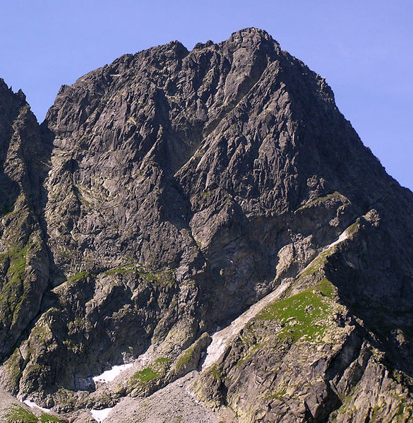 Wschodnia ściana Mięguszowieckiego Szczytu Wielkiego górująca nad Bańdziochem. Po lewej Mieguszowiecka Przełęcz Wyżnia.